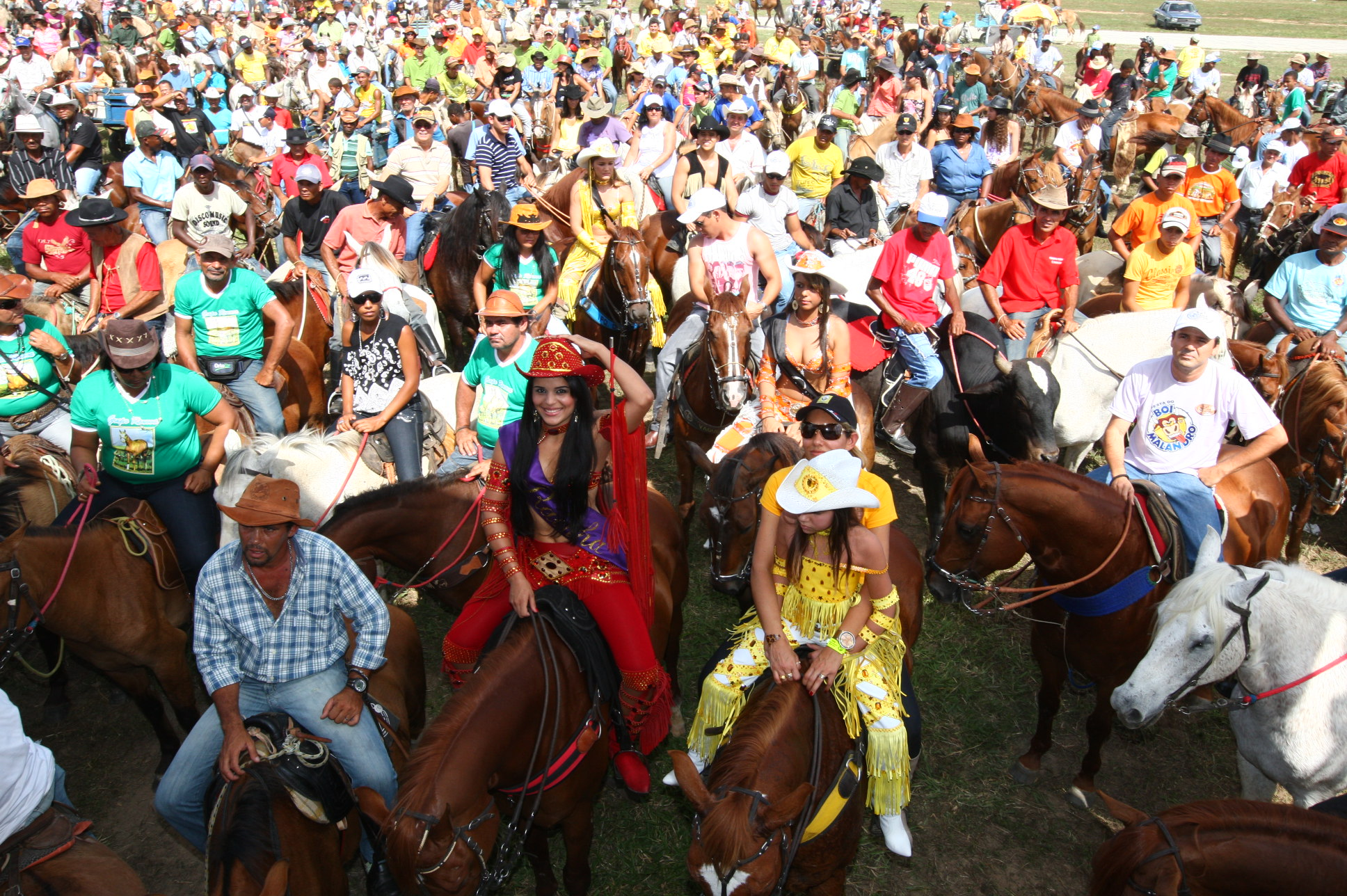 O governador Jaques Wagner visitou o município de Serrinha, nesta sexta-feira (4), onde participou da abertura da Vaquejada da cidade. Foto: Manu Dias / AGECOM